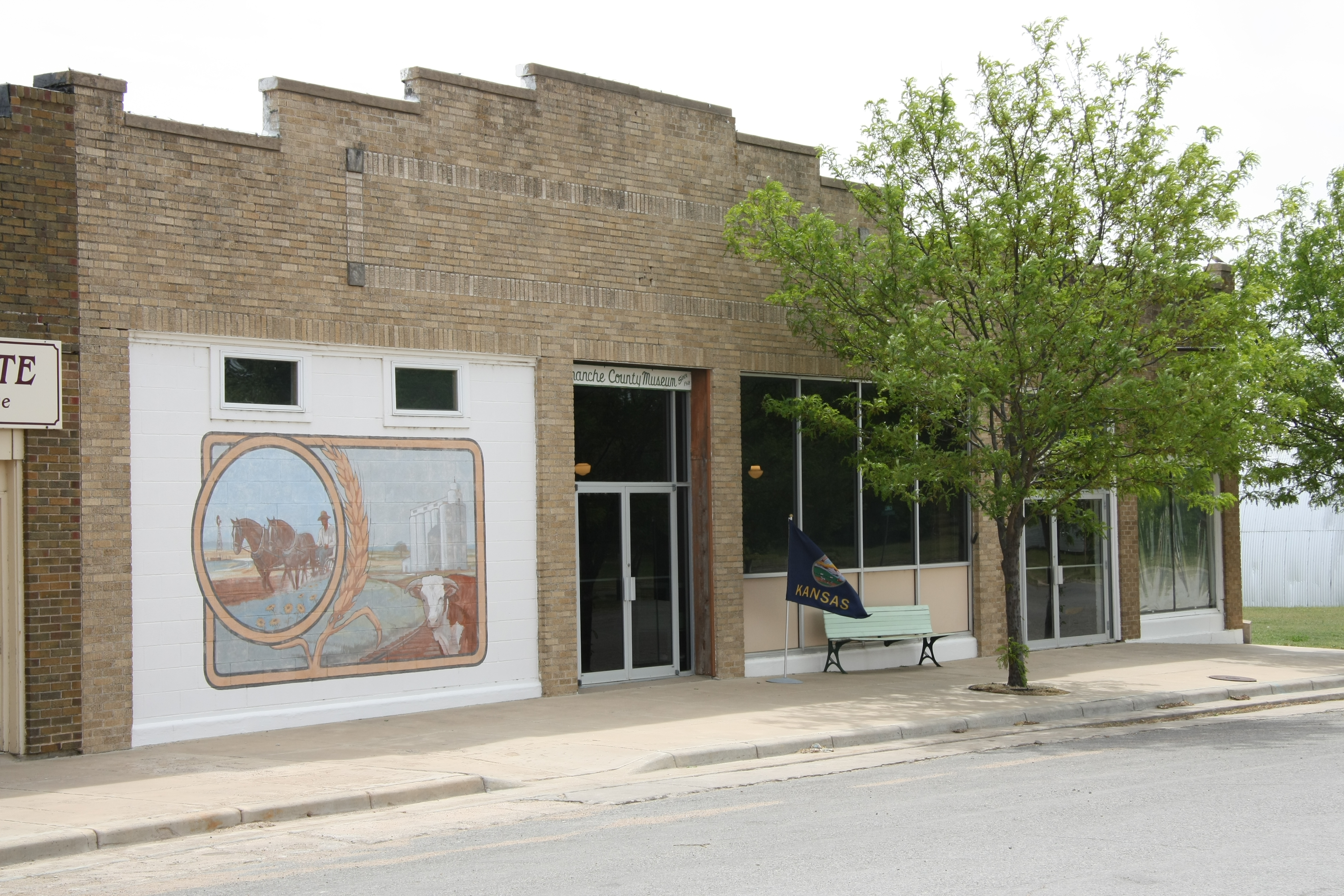 Comanche County Museum, Coldwater, Kansas